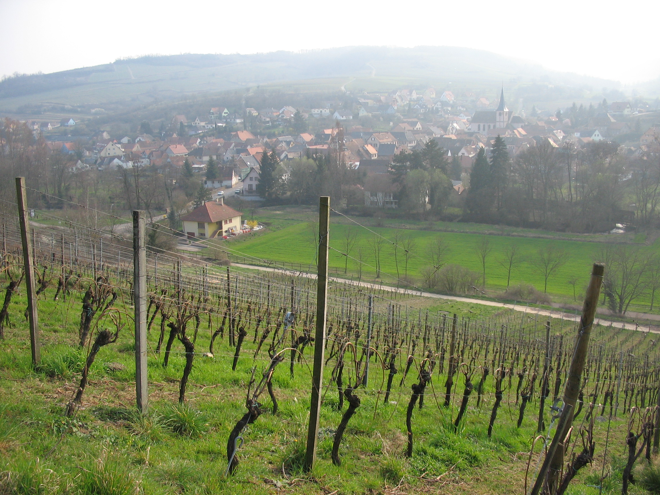 vue générale de Soultz-les-Bains dans le Bas-Rhin. Au fond, la colline du Jesselberg.